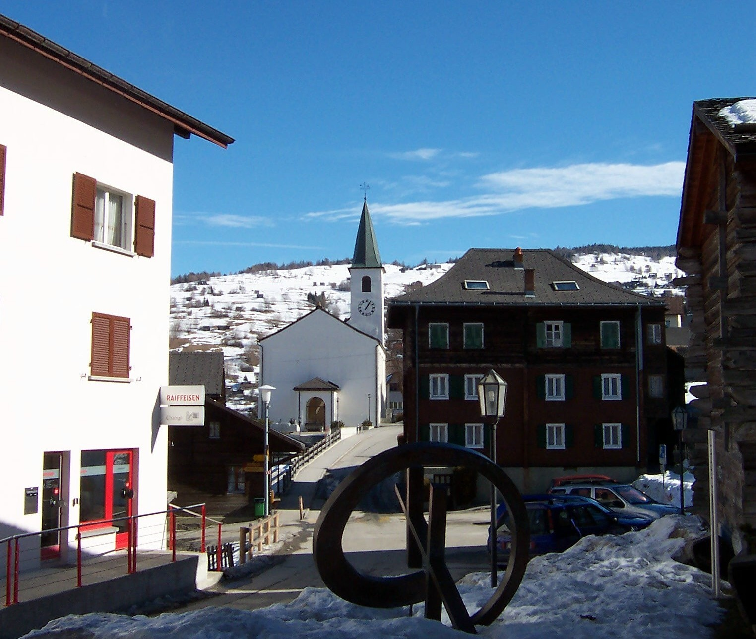 Unterbächer Dorfmitte